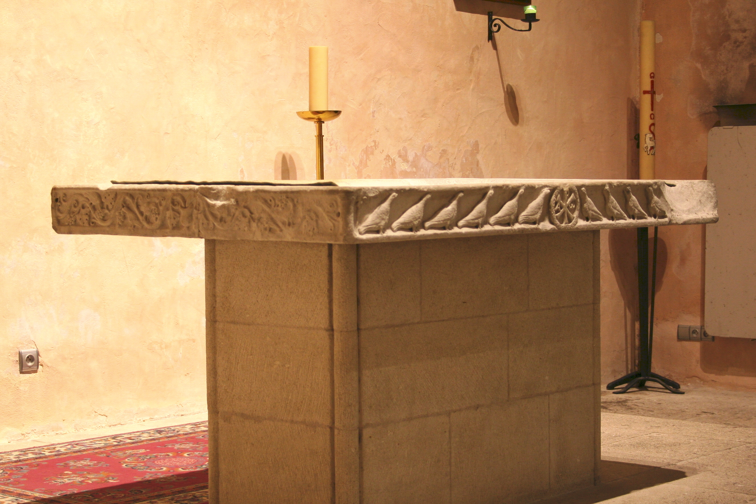 Table d'autel du Ve siècle se trouvant dans la chapelle du Saint sacrement dans l'abbaye de saint-Victor à Marseille.